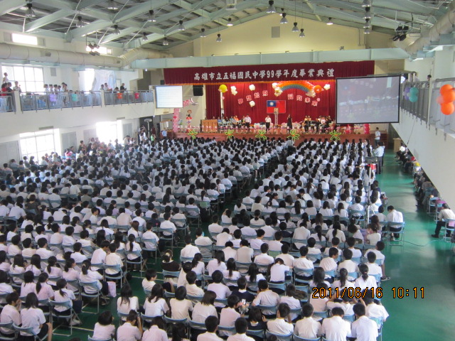 五福國中99學年度畢業典禮 首次於群英樓3樓綜合體育館舉辦畢業典禮